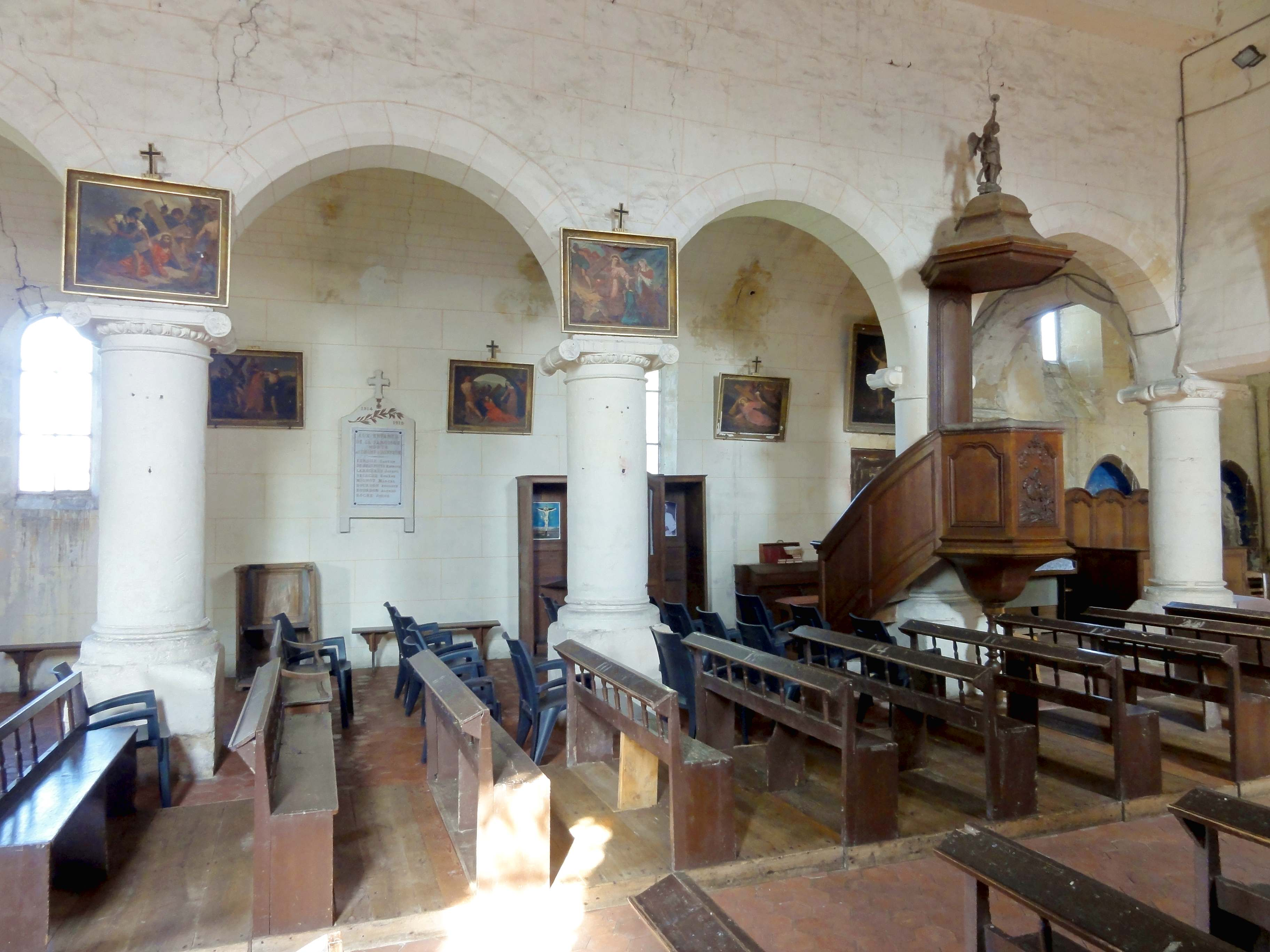 Intérieur de l'église - voir titre.